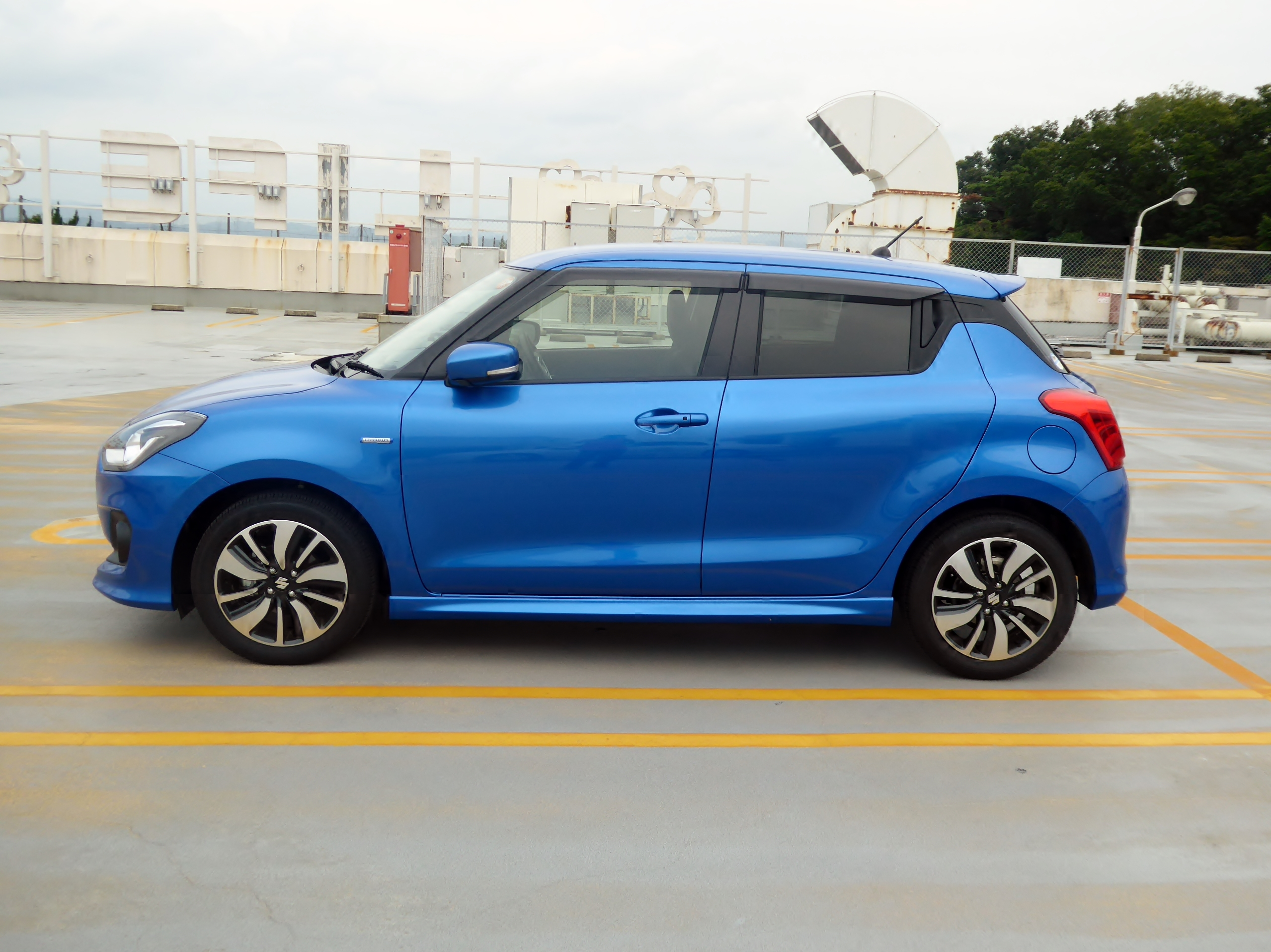 DAA-ZC53S-VBRB型スズキ・スイフトHYBRID RS 2WDを左から撮影。